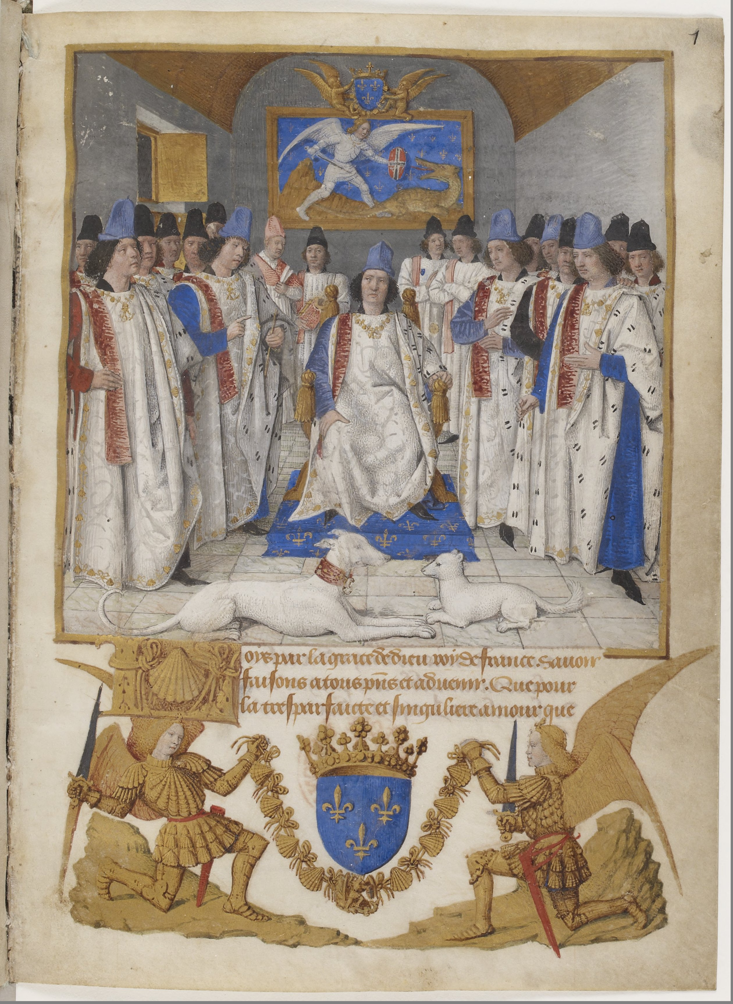 En 1890, Paul Durrieu, conservateur adjoint au musée du Louvre, tente d'identifier les personnages représentés de la manière suivante : les quatre personnages du fond derrière le roi sont, à gauche le chancelier de l'ordre, Guy Bernard, évêque de Langres, au bonnet et camail de couleur vieux rose, le greffier Jean Robertet qui tient le livre de l'ordre dans les mains, et à droite le héraut, Jean Montjoie, surnommé le Mont-Saint-Michel et le trésorier Jean Bourré. Au premier plan à droite se trouve Louis de Bourbon-Roussillon puis Jean II de Bourbon, Louis de Luxembourg-Saint-Pol et Louis de Laval. À gauche, au premier plan, Charles de France, frère cadet du roi, et derrière lui avec le bâton de commandement Antoine de Chabannes.